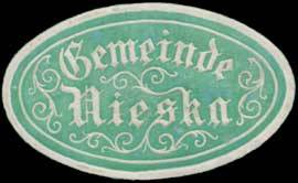 Sealing stamp Title: Gemeinde Nieska Description: grün, weiß, geprägt Place: Nieska size: 2x4 cm